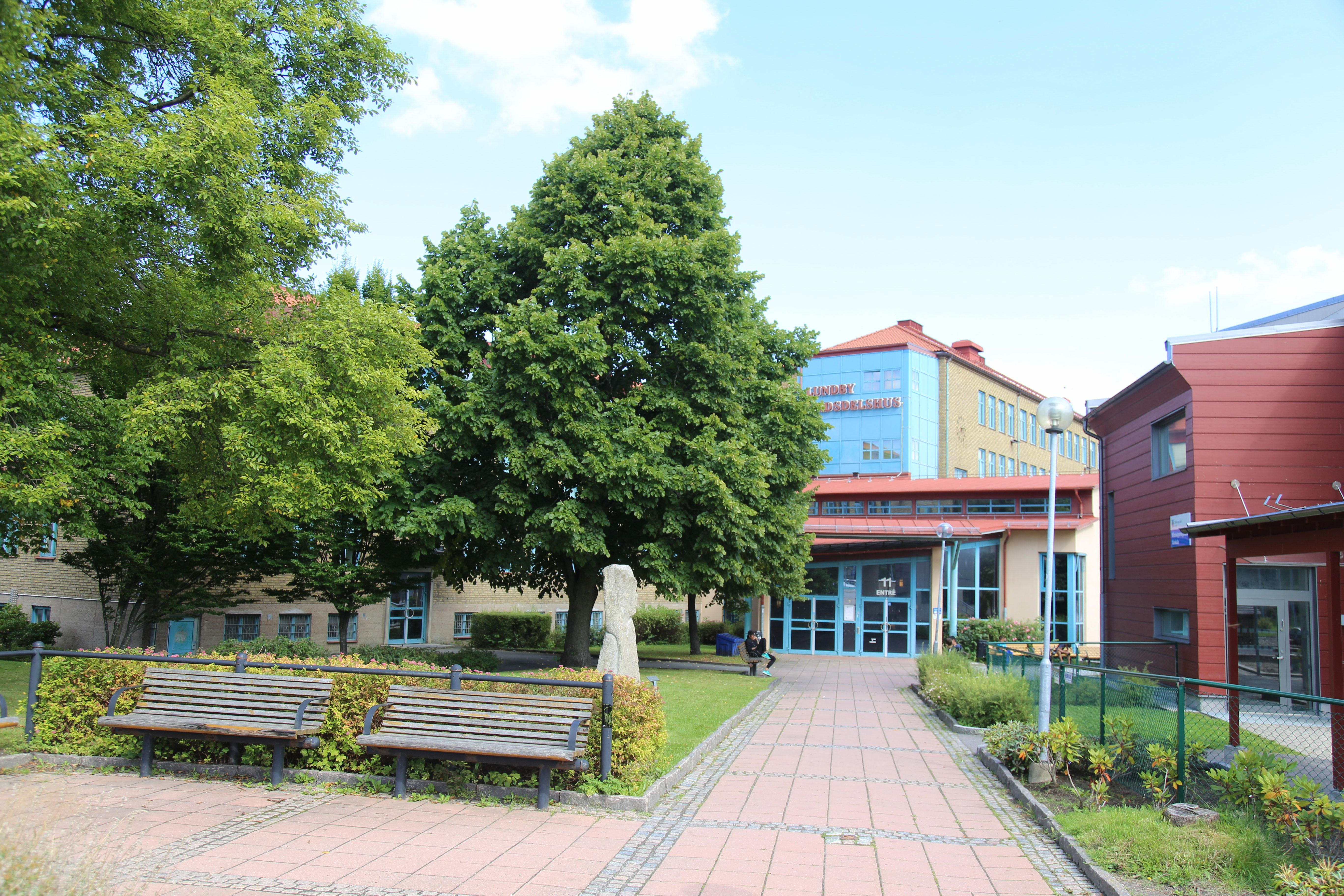 Lundby stadsdelshus.